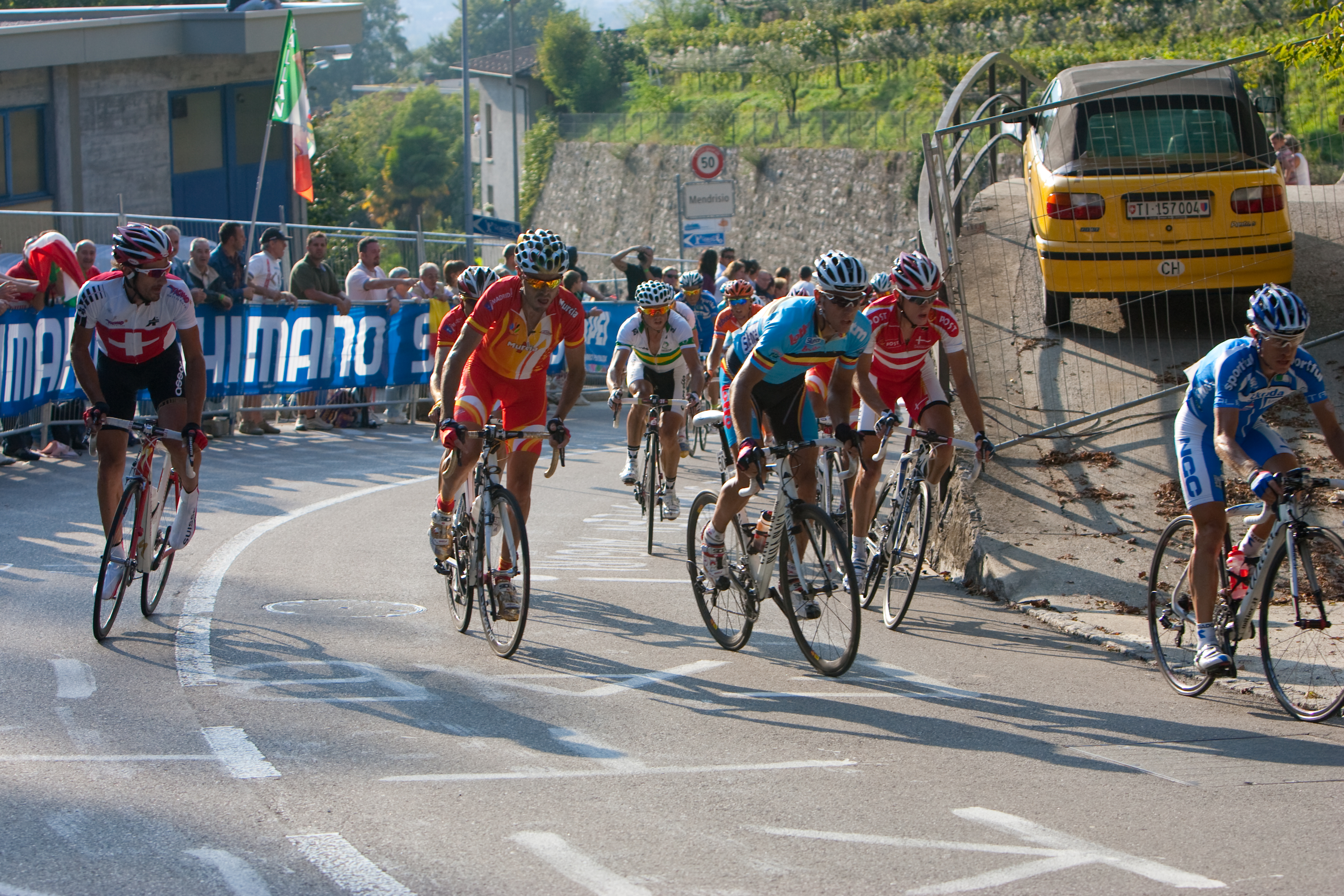 Dernier tour des championnats du monde de Mendrisio. Philippe Gilbert au centre.